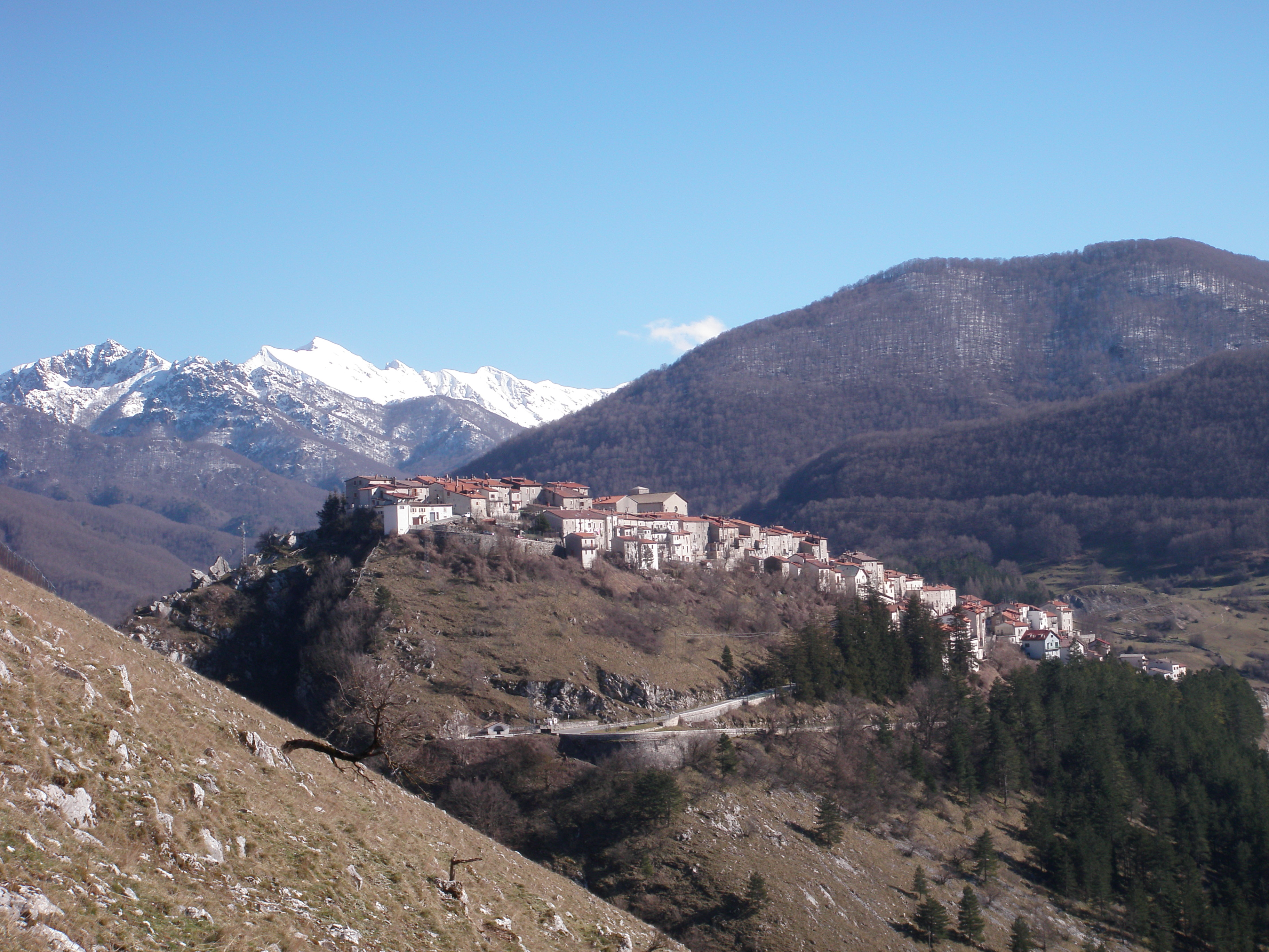 Opi Paese, visto da Monte Marrone This is a photo of a monument which is part of cultural heritage of Italy.